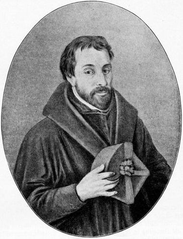 Fridericus Spee. Stich nach einem Ölgemälde im Marzellengymnasium in Köln